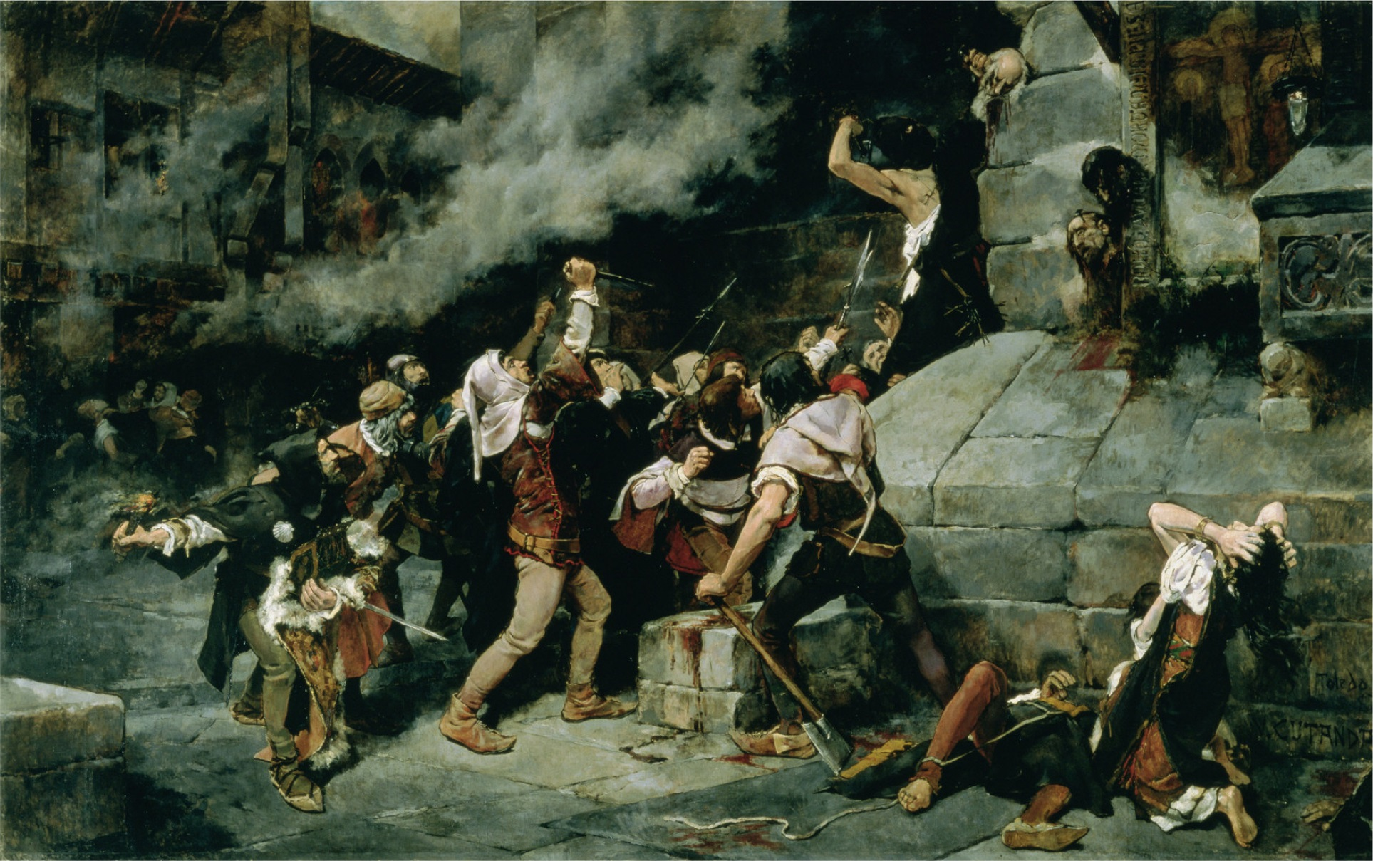 La obra representa una matanza de judíos llevada a cabo en la Edad Media en la ciudad de Toledo, (España).